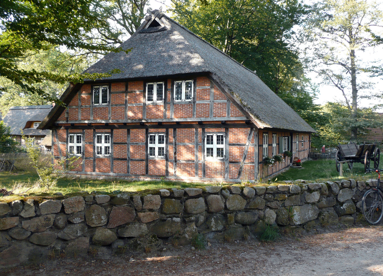 Dat ole Huus